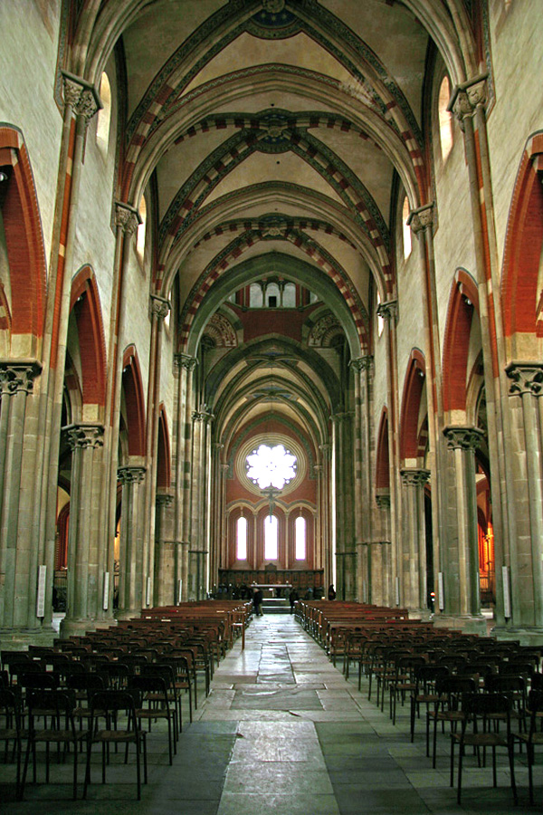 La navata centrale della Basilica di Sant'Andrea di Vercelli